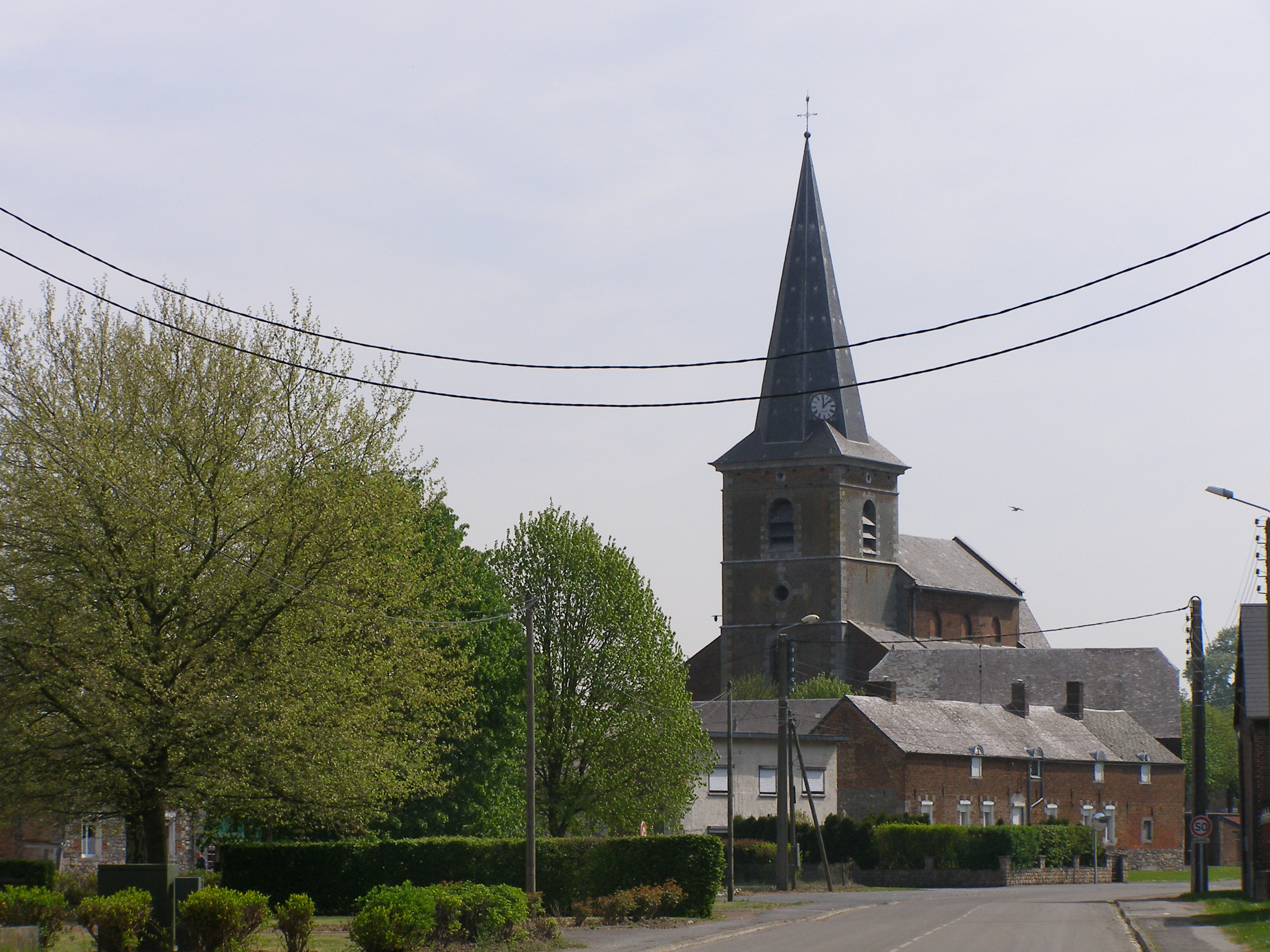 L'église.